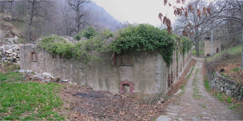 esterno prima del restauro del Forte di Machaby facciate nord ovest. Forte di Machaby, Arnad, Valle d'Aosta, Italia.